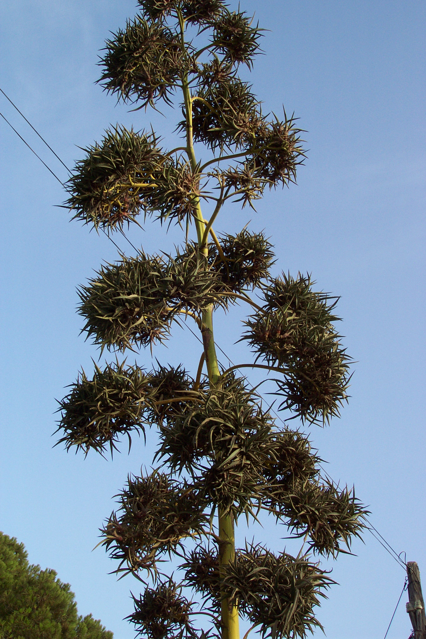 Agave vivipary.